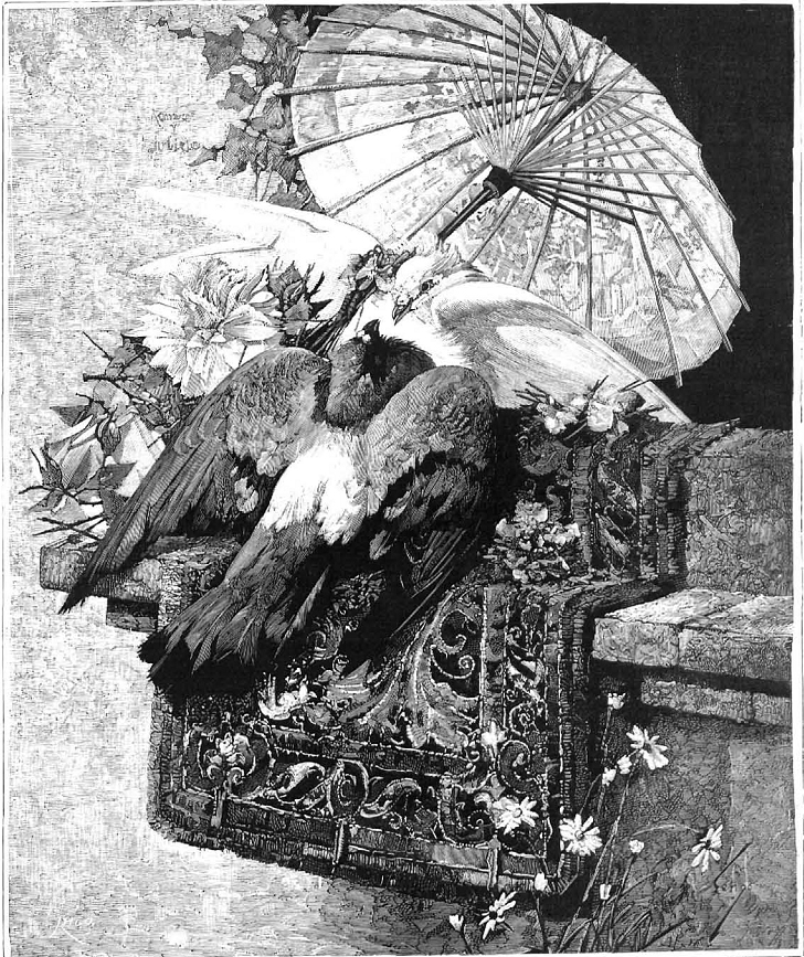 Romeo y Julieta, cuadro de Horacio Lengo, publicado en la revista española La Ilustración Española y Americana.